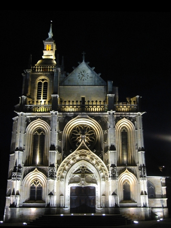 Église Saint-Étienne de Bar-le-duc, Meuse, Lorraine, France